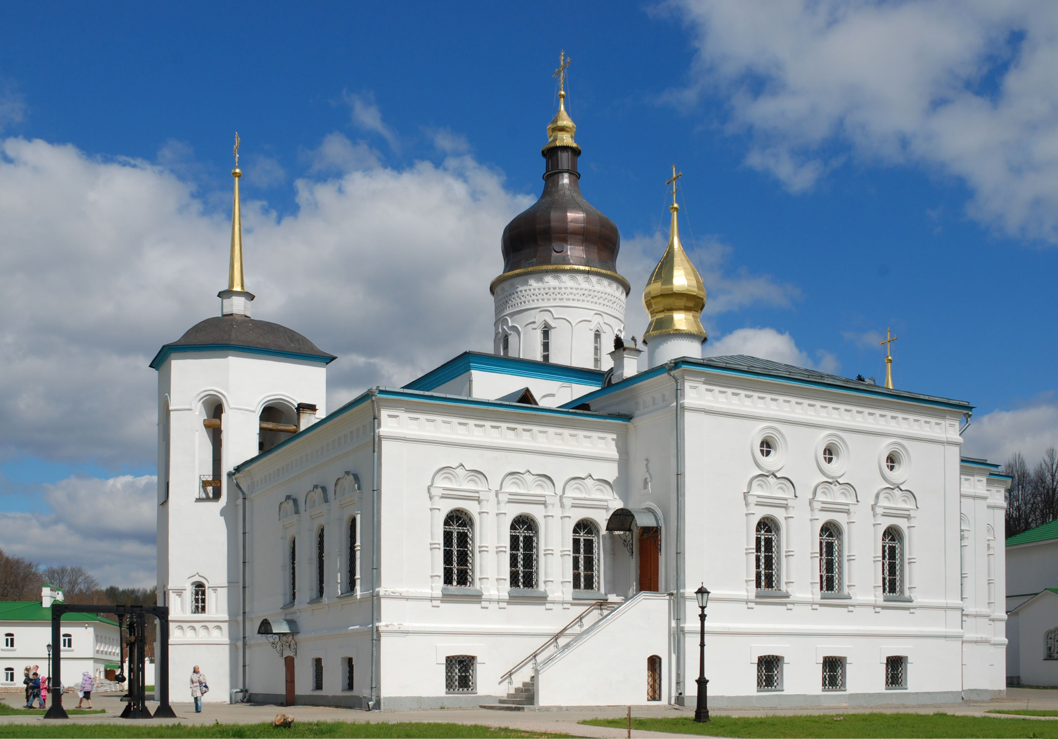 Собор Спасо-Елизаровского монастыря (Трехсвятительский) (Псковская область, Псков, село Елизарово)